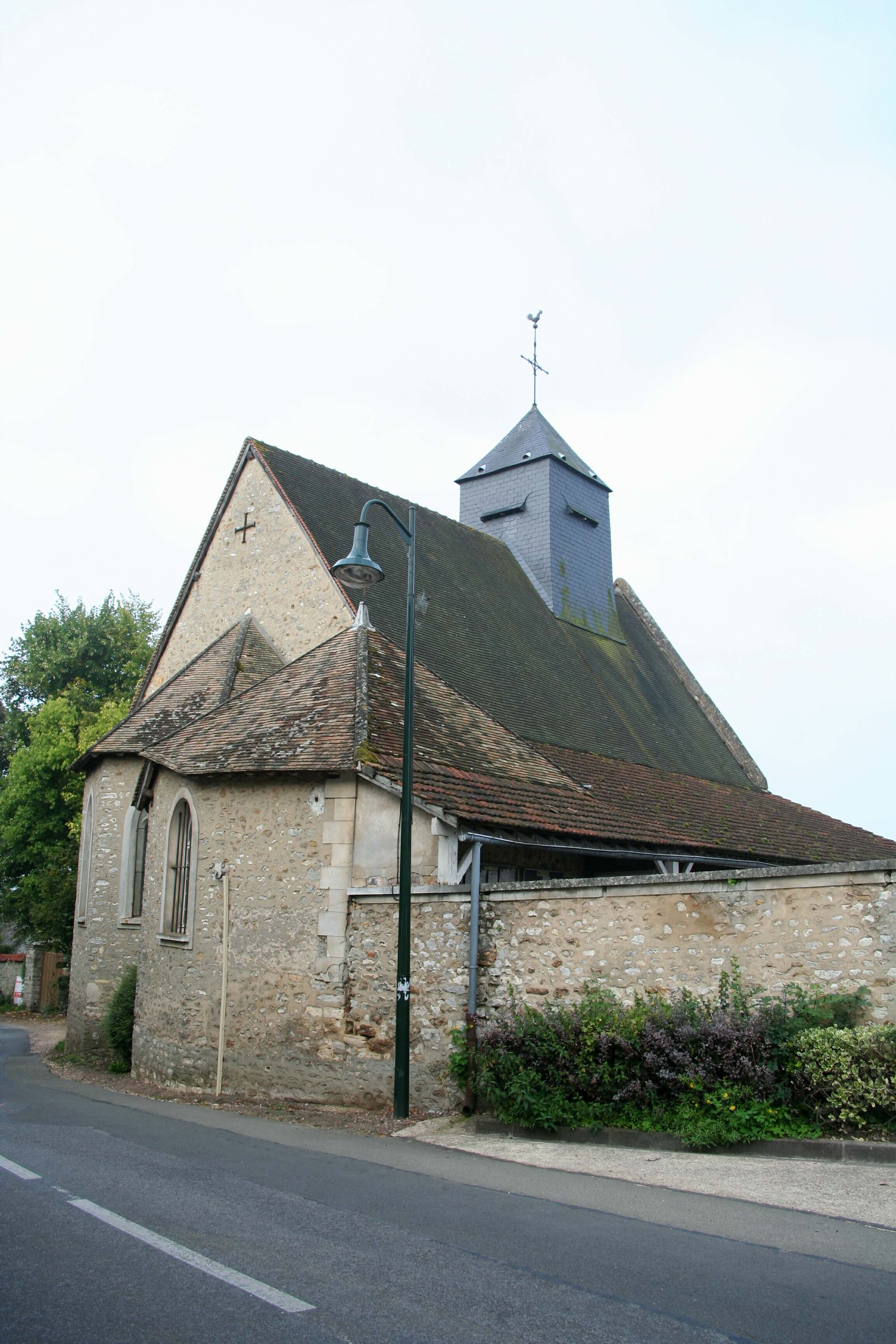 Église de La Chapelle-Réanville - Eure (France)